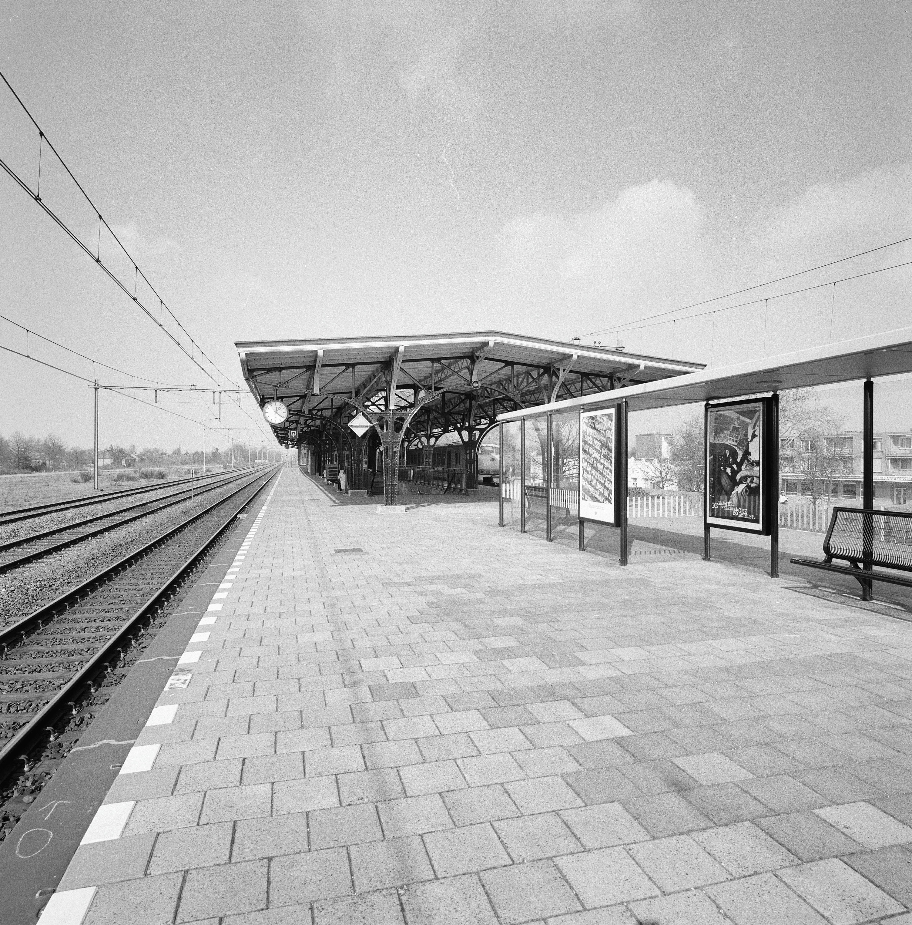 Station/ Perronoverkapping: Station, overzicht perronoverkapping (opmerking: Gefotografeerd voor Monumenten In Nederland Noord-Brabant)